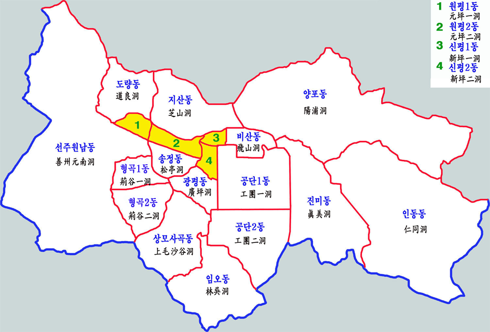 경북 구미시 시내동 행정구역